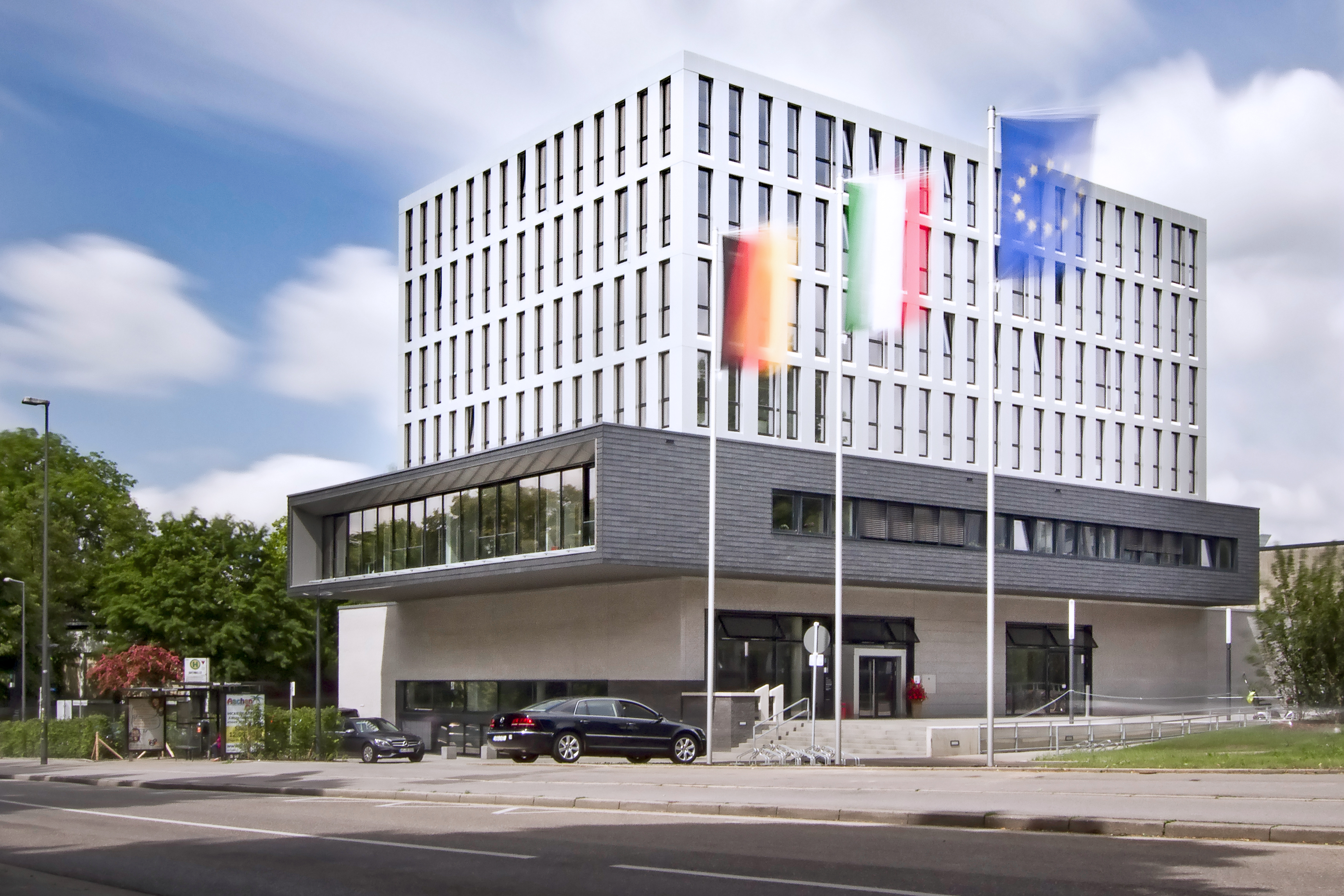 Hauptgebäude der FH Aachen in der Bayernallee 11 in Aachen